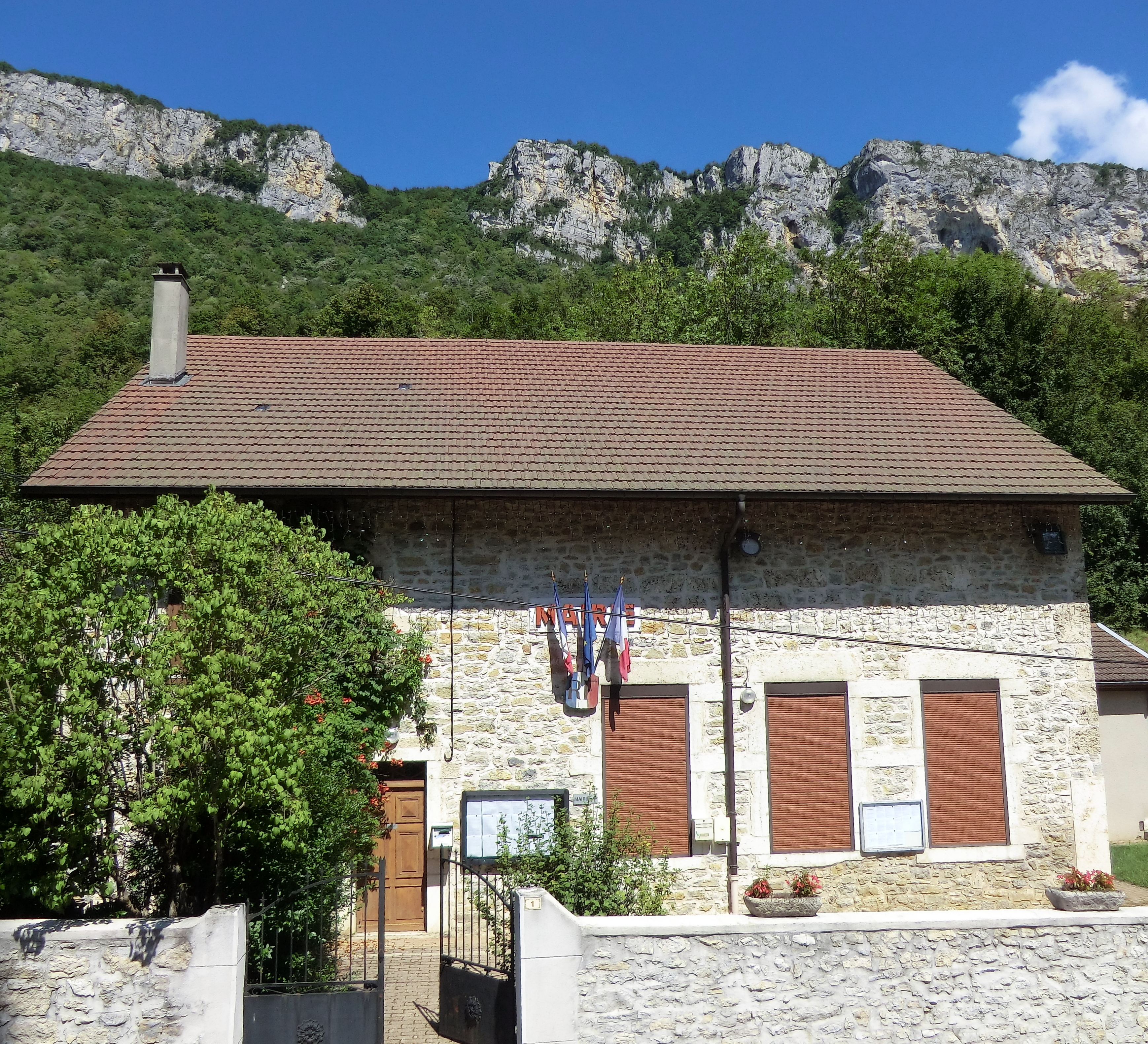 Mairie de La Burbanche.